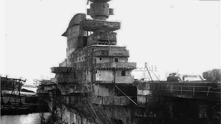 La portaerei Aquila nel Porto di Genova con l'isola danneggiata dagli incendi delle bombe alleate in una Foto del Consorzio Autonomo del Porto di Genova della Collezione Giorgio Parodi